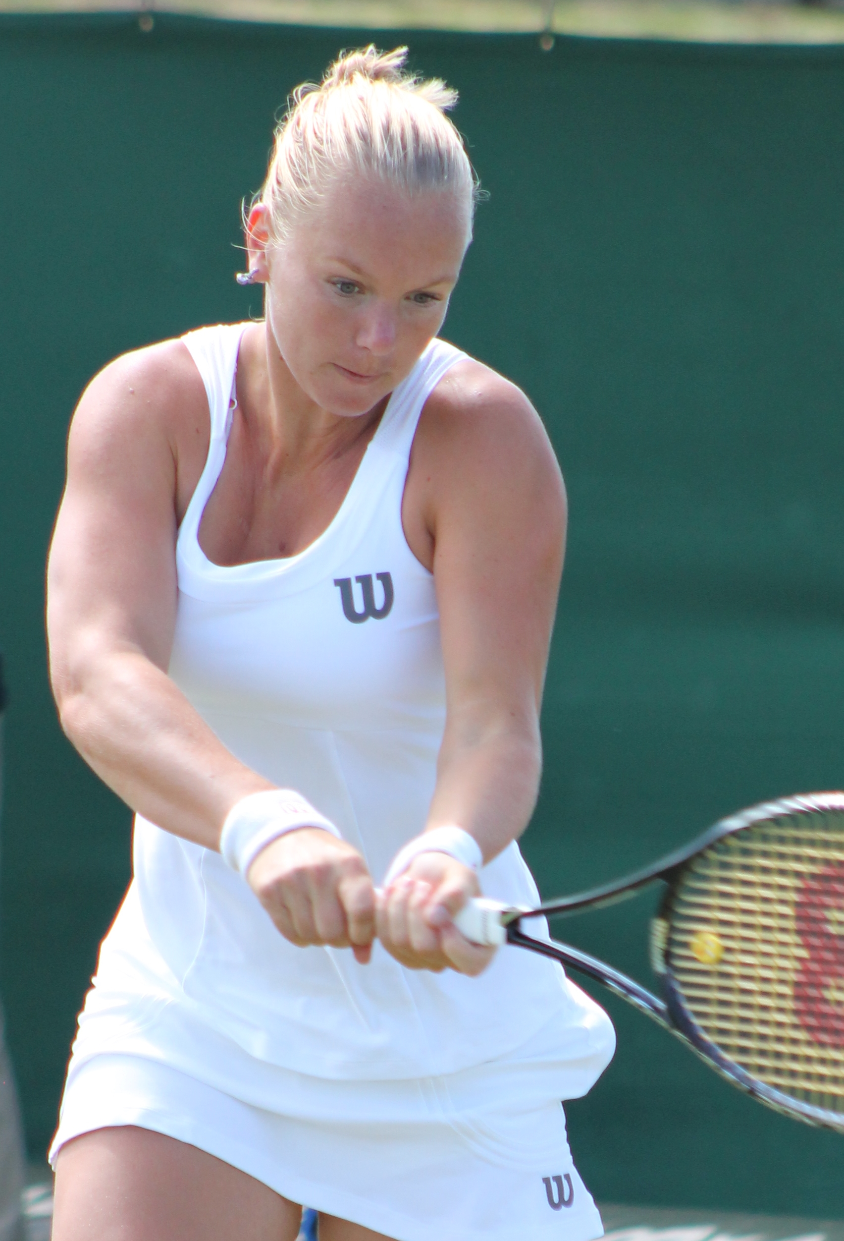 Bertens WMQ14 (18)